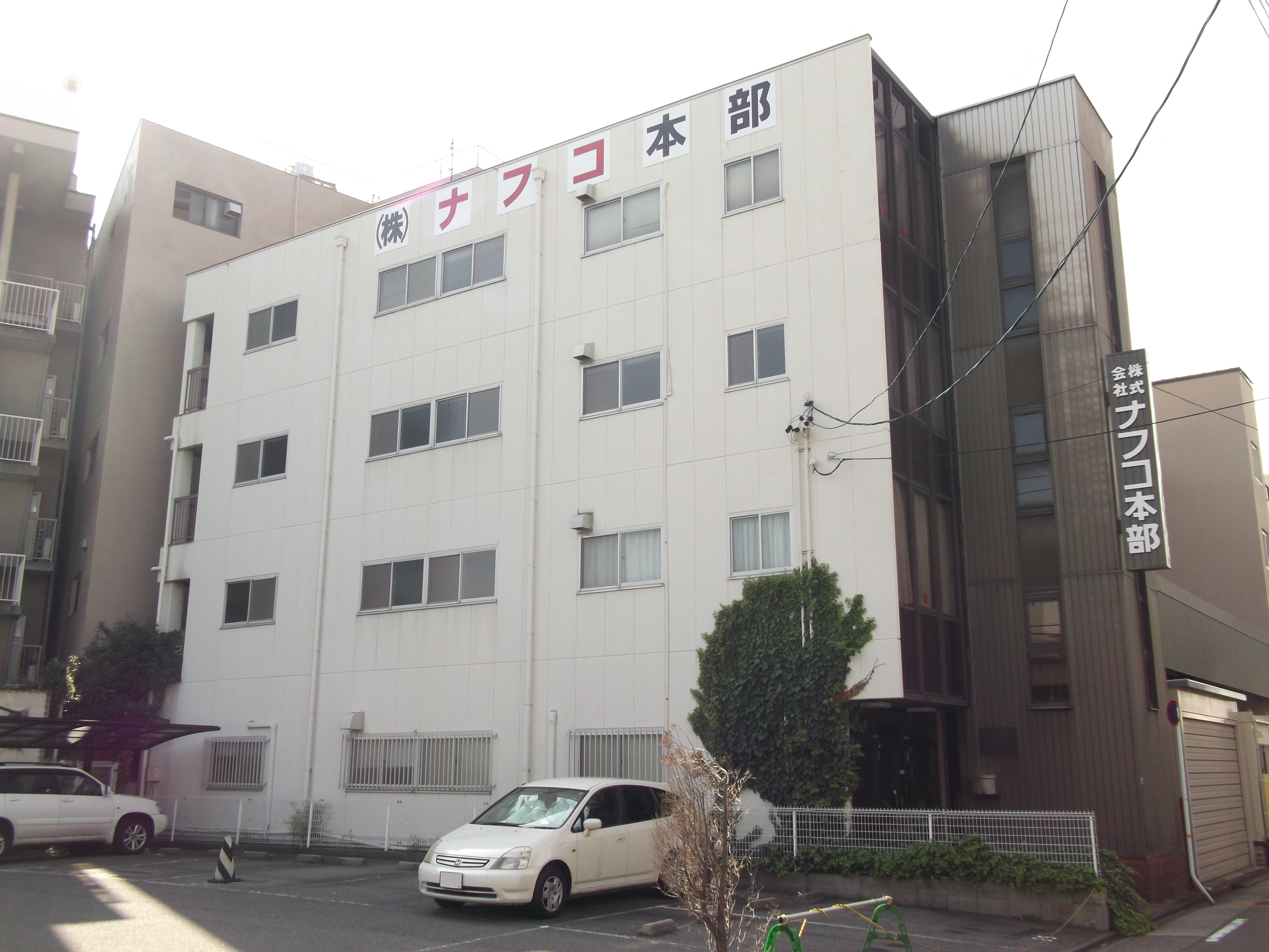 名古屋市熱田区の協同組合ナフコチェーン本部を北側公道東側より撮影。停車車両のナンバープレートにつき画像修正。